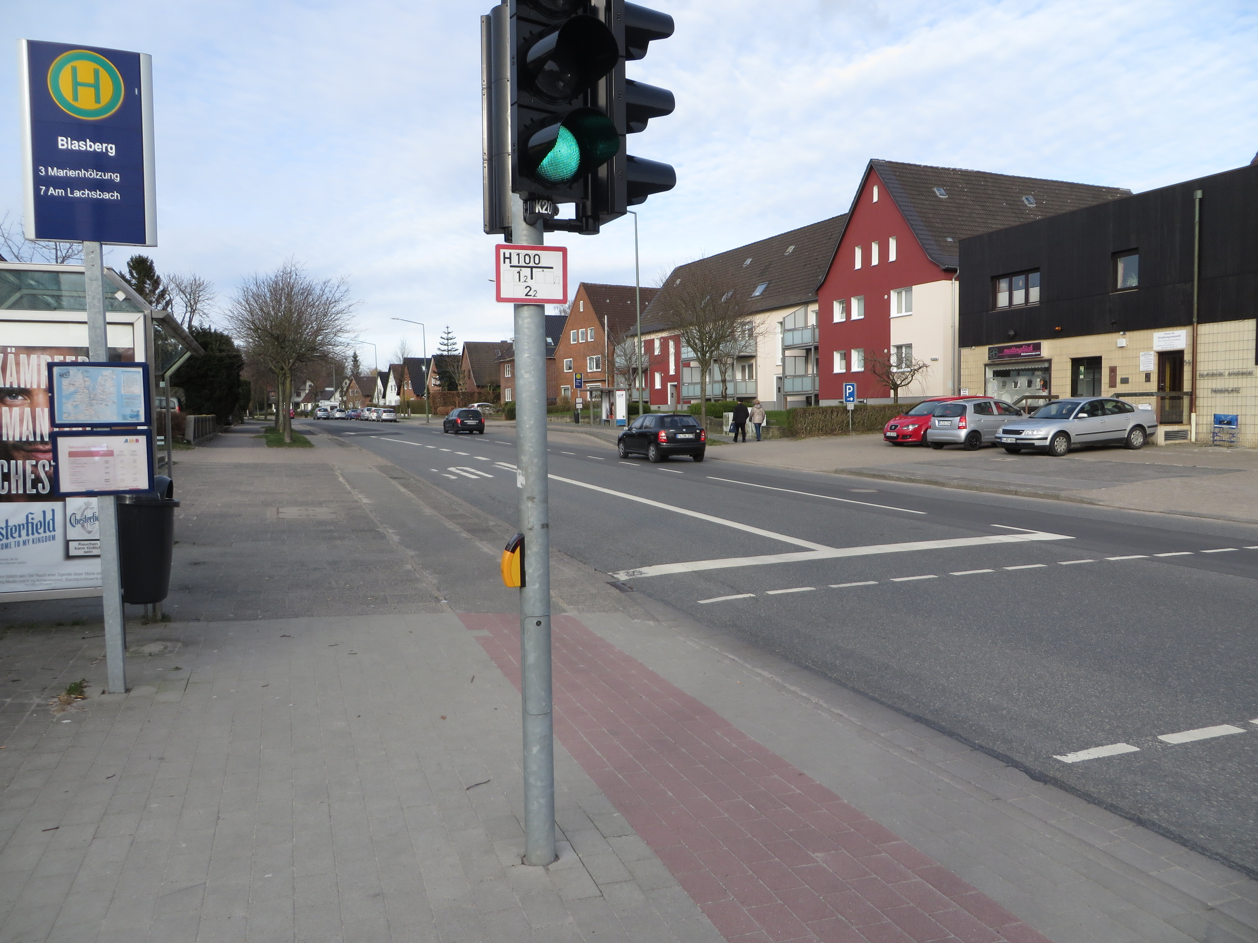 Bushaltestelle am Blasberg sowie die Alte Blasberg-Apotheke (Flensburg April 2015)